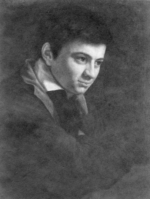 Bildnis des Malers Adolf Zimmermann.